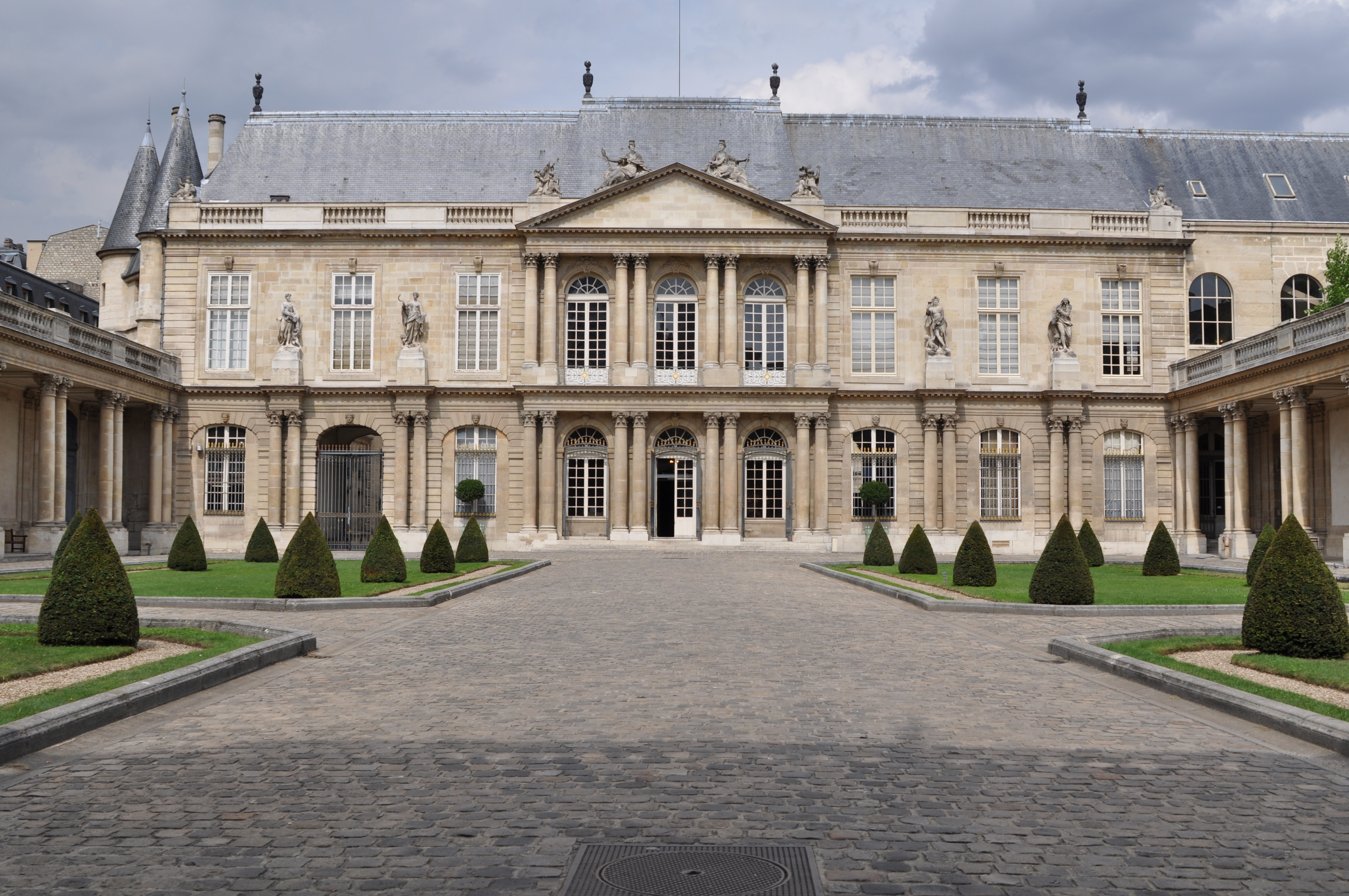 Hôtel de Soubise, Paris.